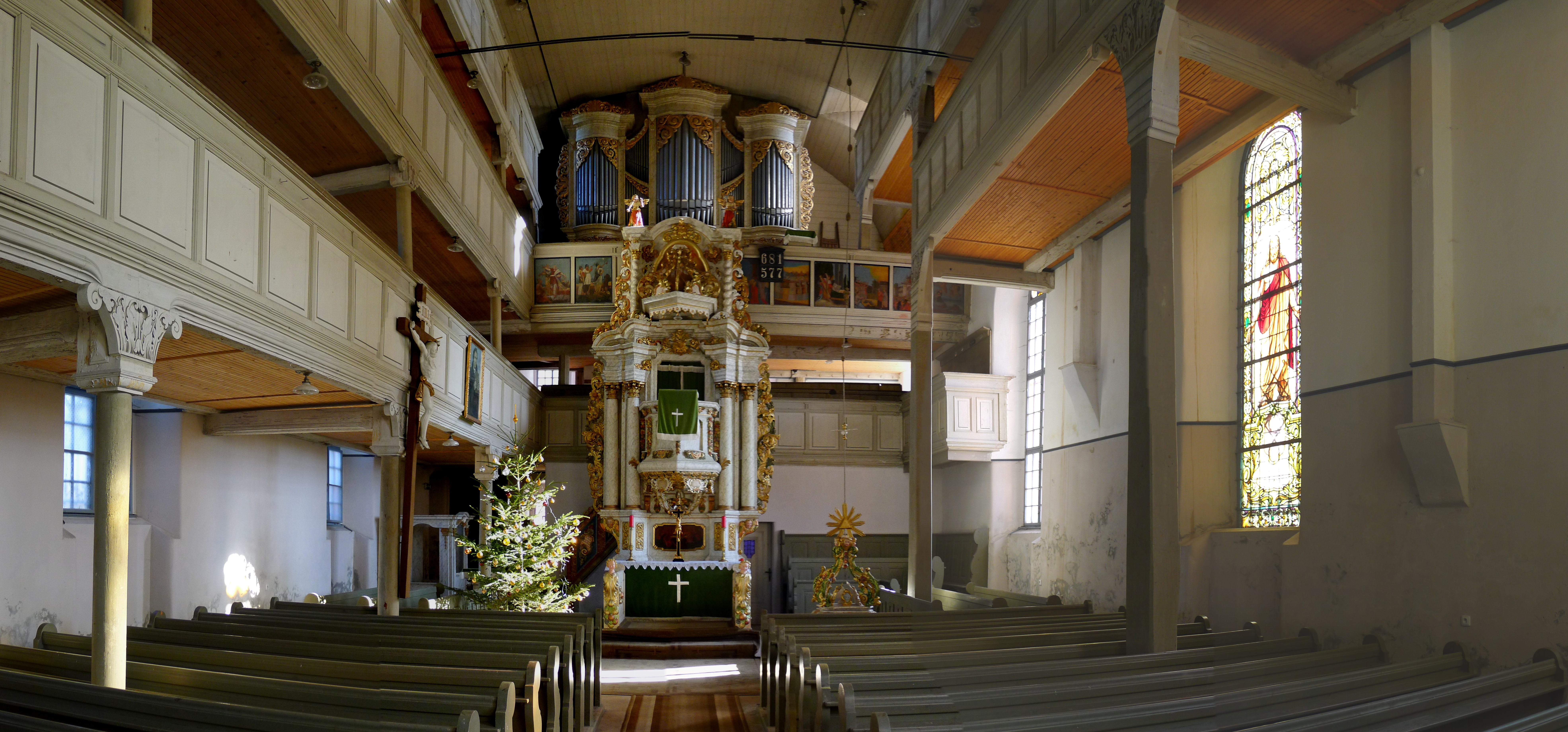 snímek-panorama interieru evang.kostela